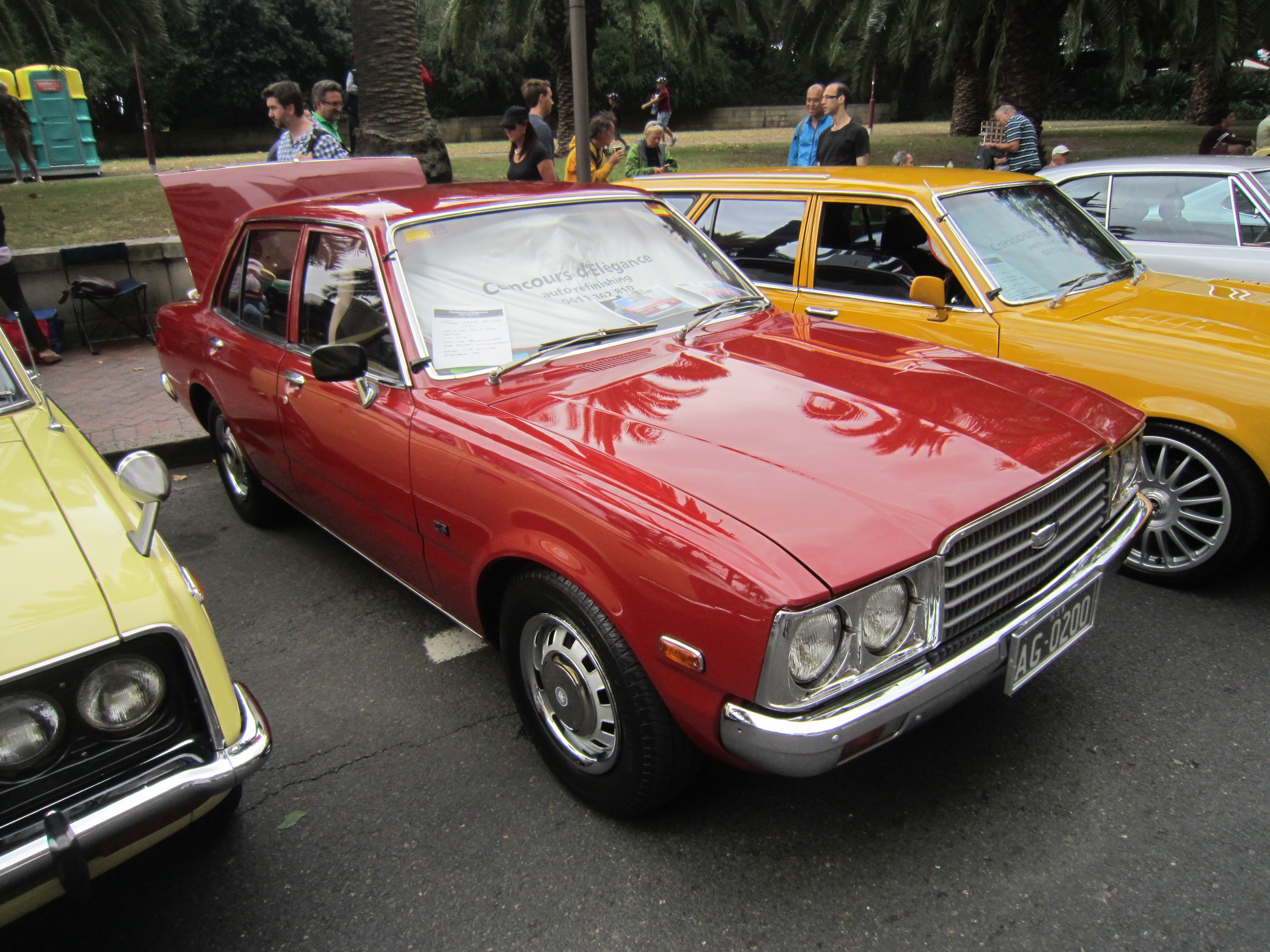 Toyota Corona RT100